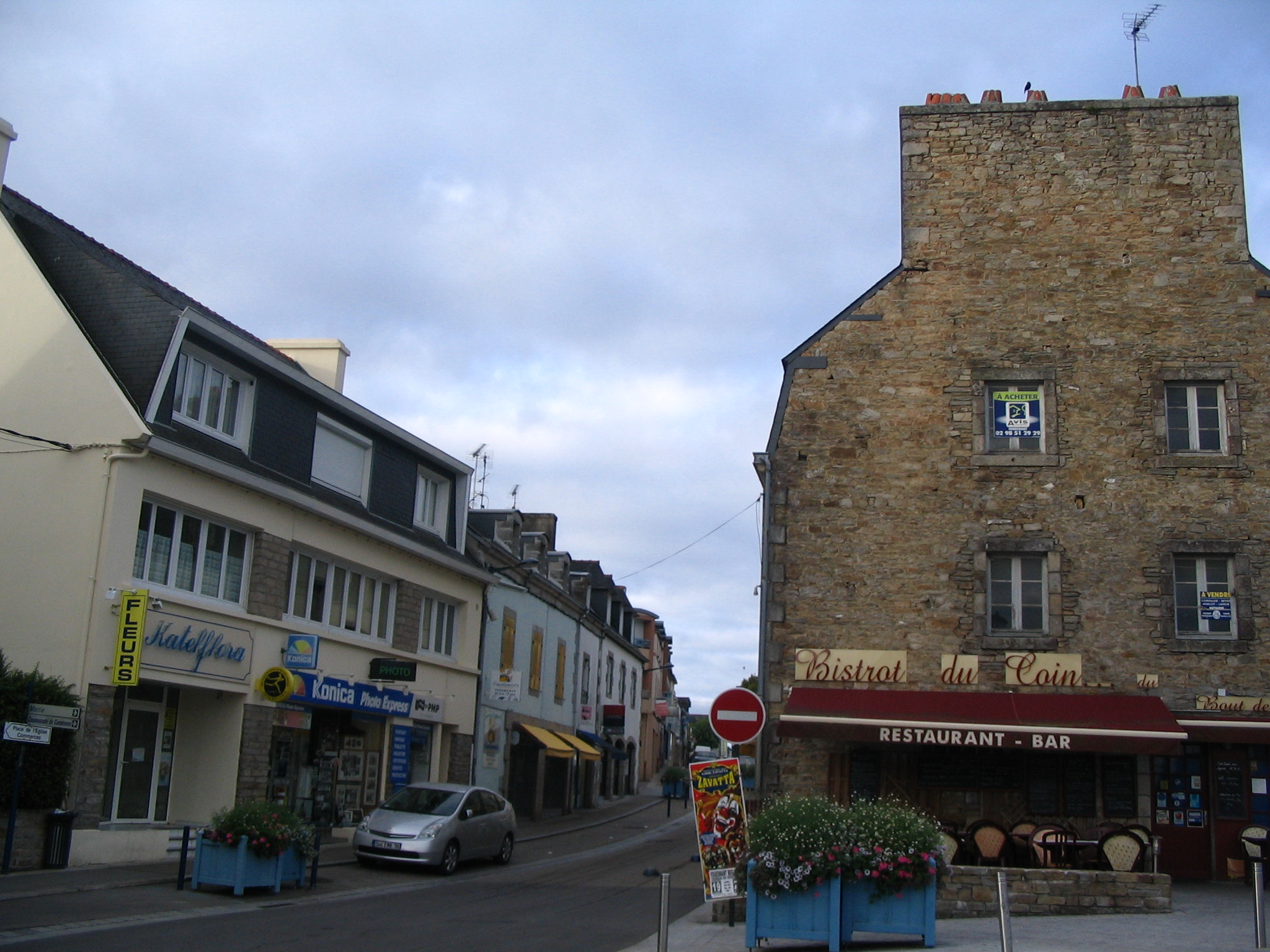 Fouesnant_- Finistère - France -rue de Cornouaille